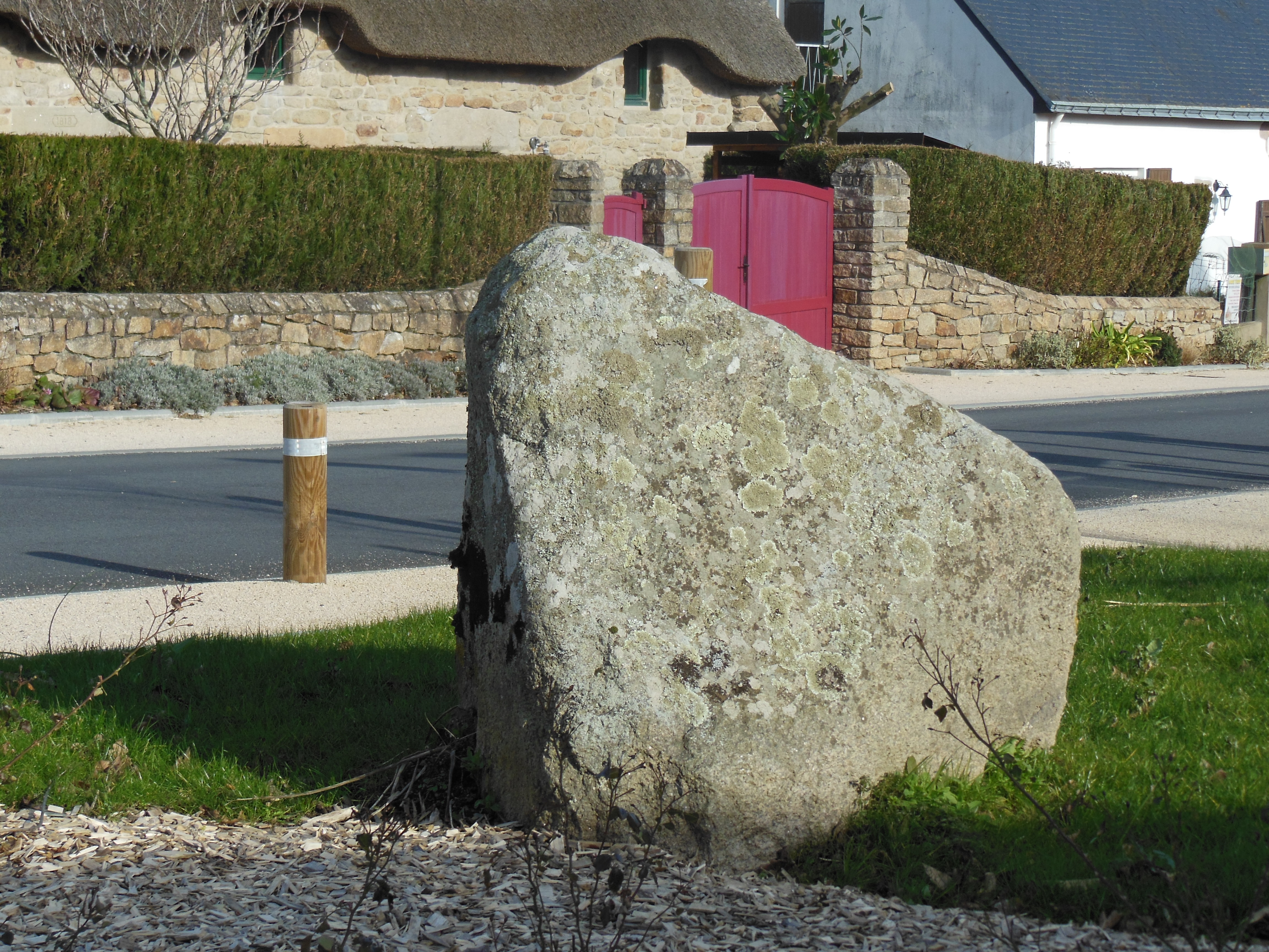 Mégalithe de Coispéan, situé sur la place du village (commune de La Turballe, Loire-Atlantique, France)